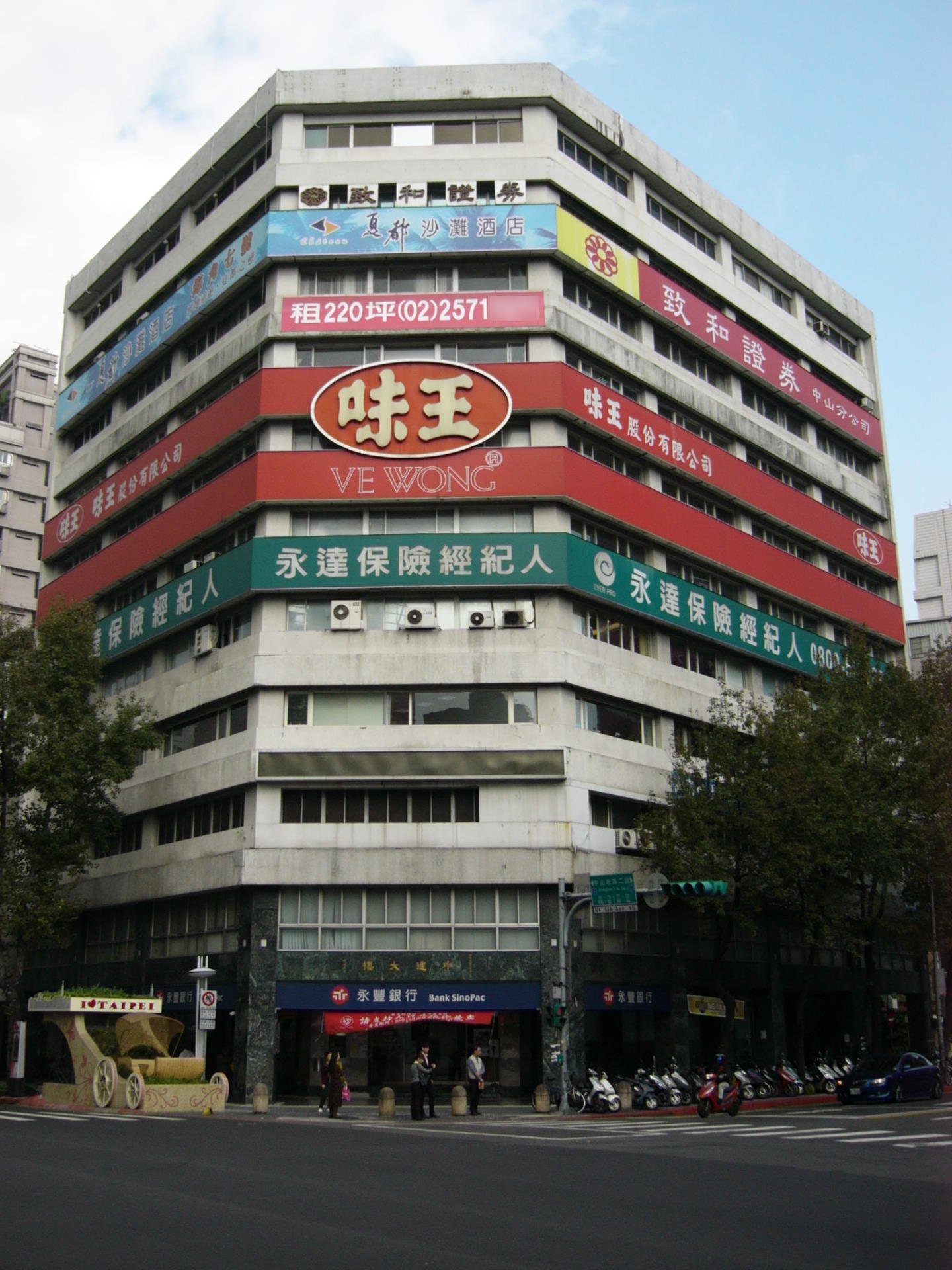 中文（台灣）: 中建大樓，沈祖海設計及監造，1樓是永豐銀行中山分行。